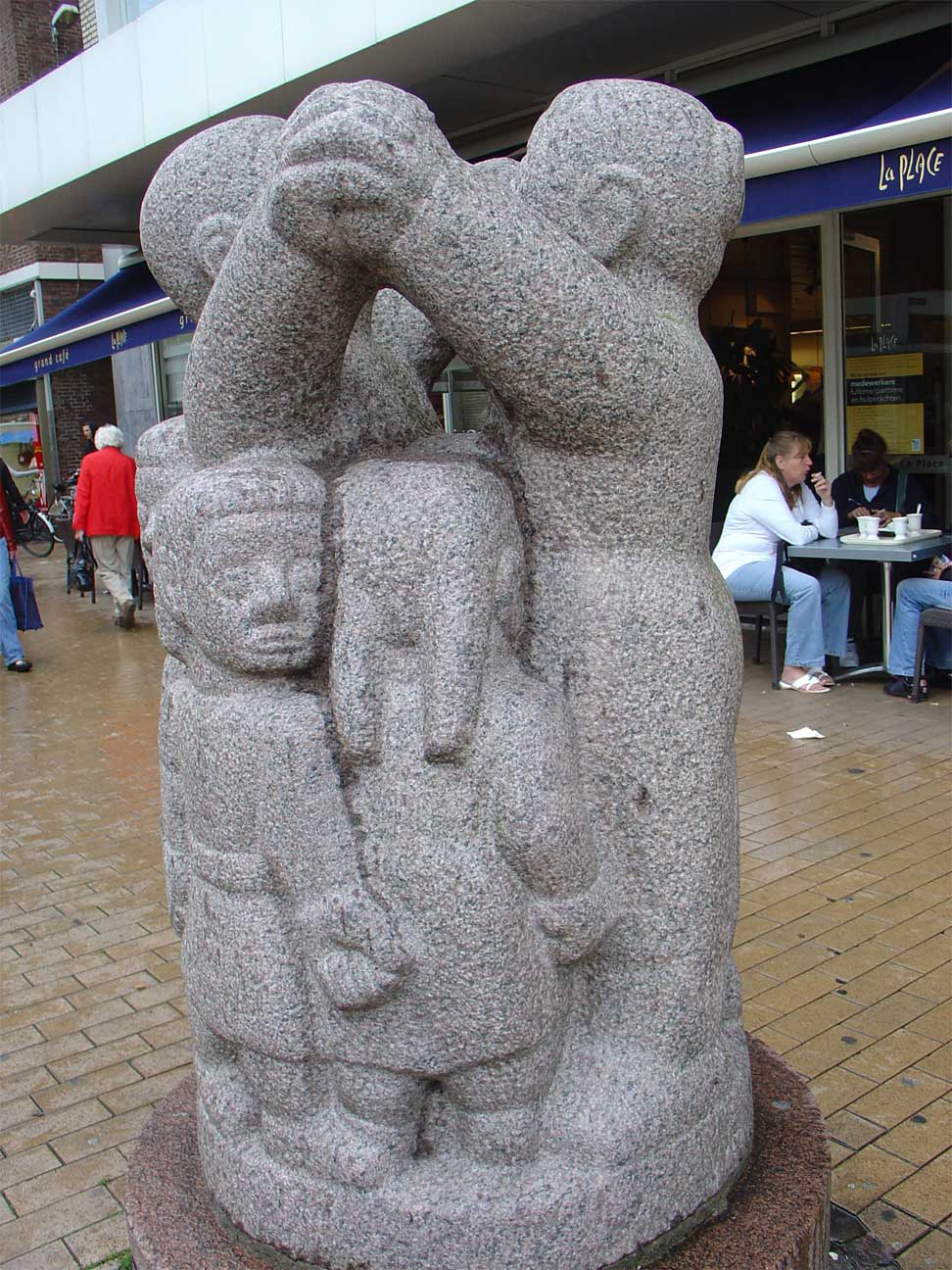 Bro Bro Brille door Gunnar Westman Groningen (nabij V. en D.)